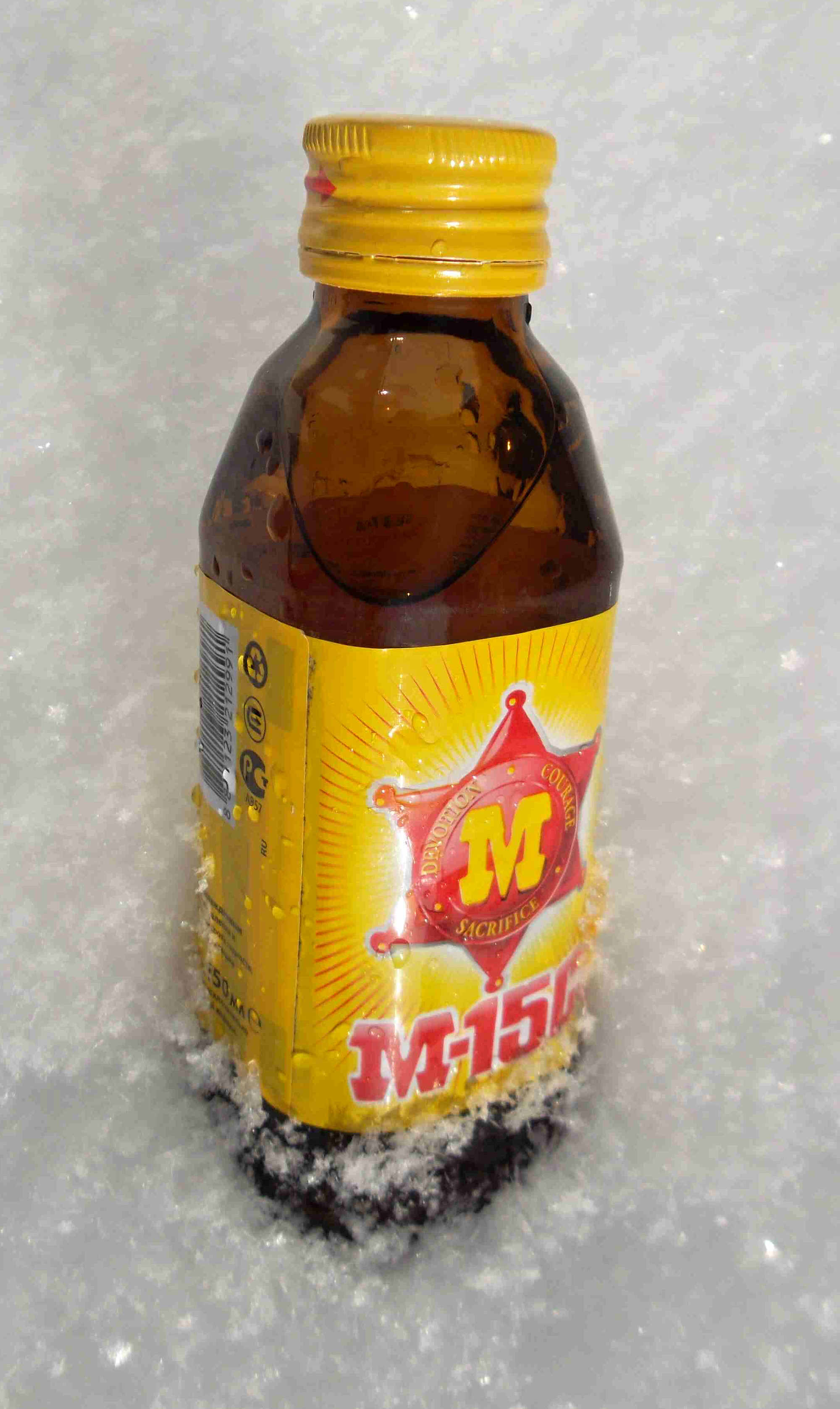 Энергетический напиток М-150 из Таиланда, поставляется в Россию с 2011 года компанией "Азия Н". Употреблять охлажденным :)